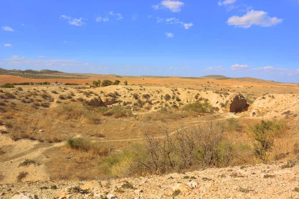 Amphithéâtre, Henchir Kasbat